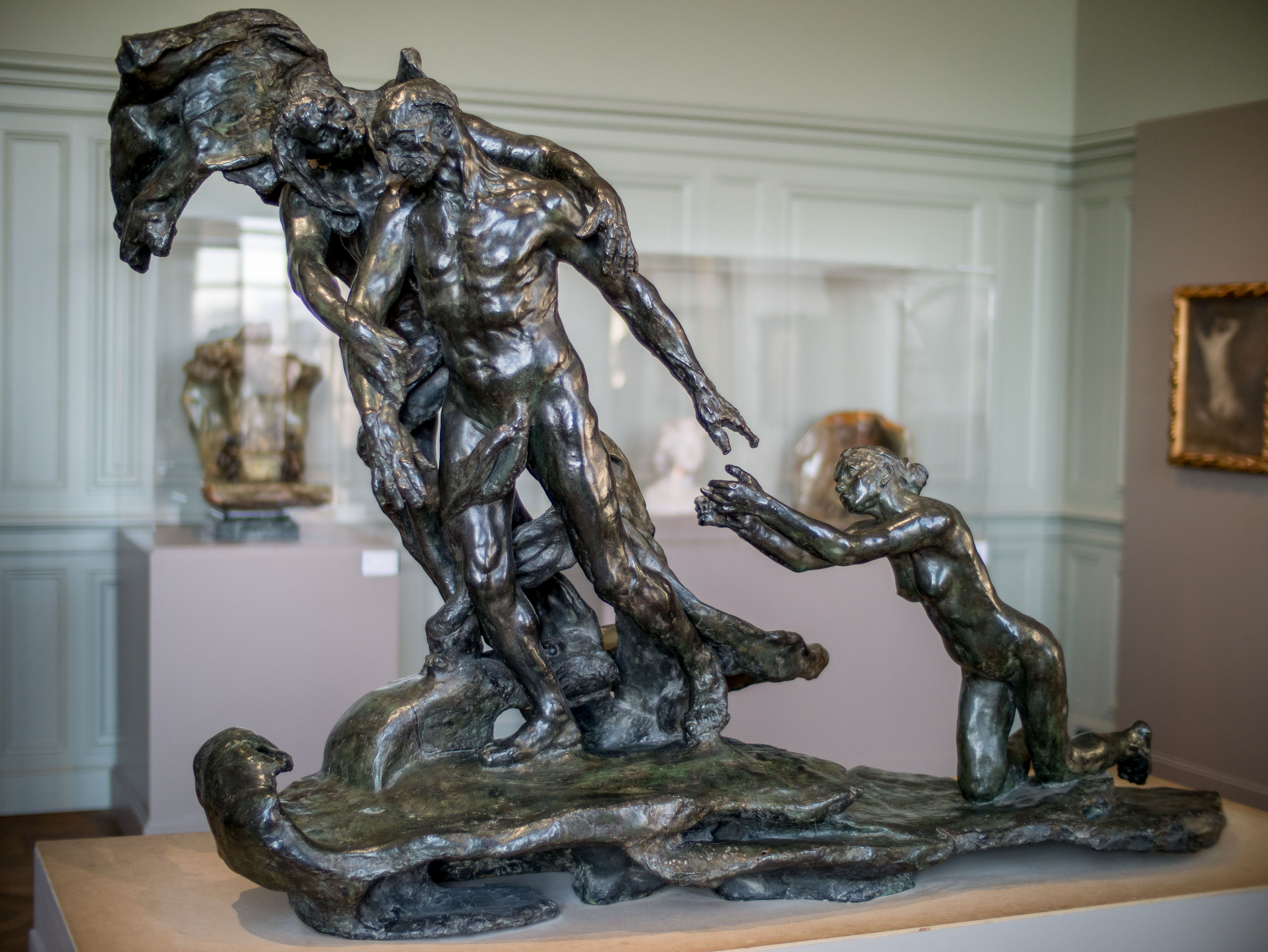 Camille Claudel, "L'Âge mûr", 1899, bronze, fonte Frédéric Carvilhani, après 1913 (?), Musée Rodin, Paris, France